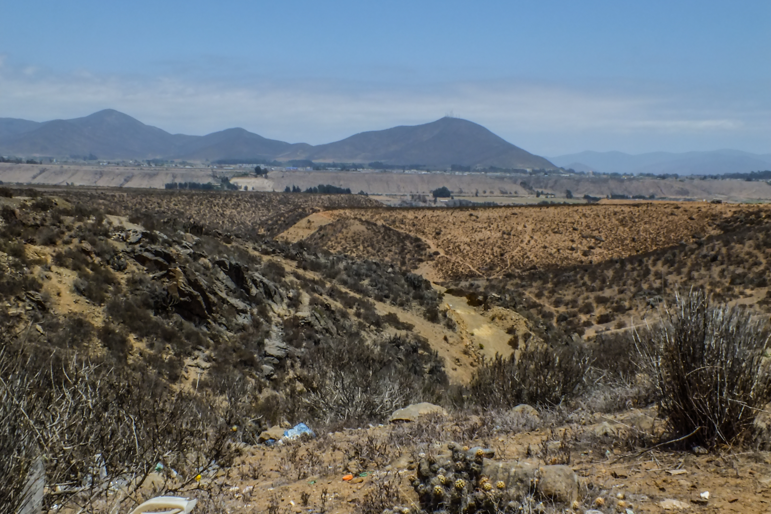 Sitio donde se desarrollo la Batalla de Los Loros, 14 de Marzo de 1859 en plena Revolucion de 1859